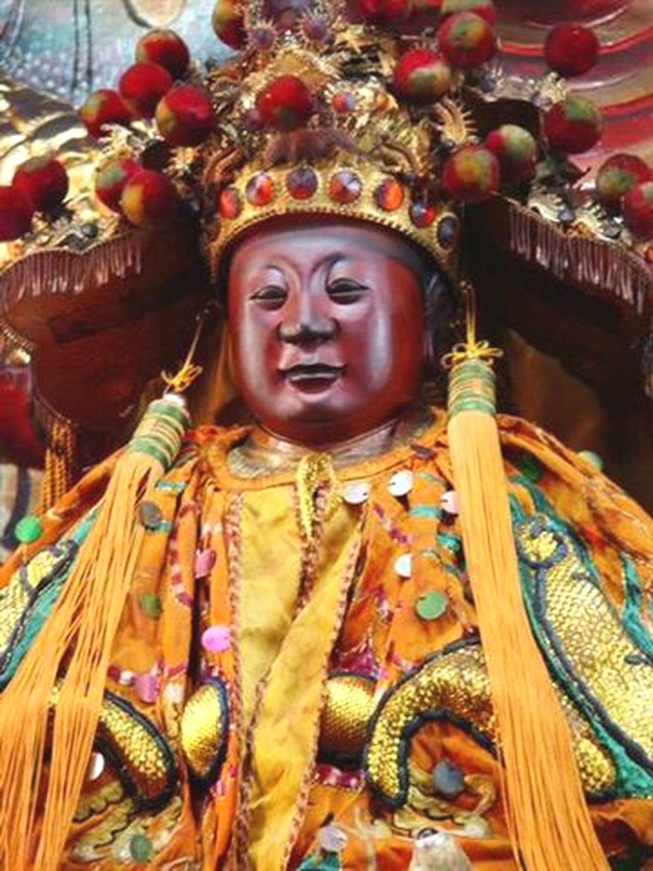 中文（台灣）: 吳府千歲，諱名孝寬，江蘇省吳縣人，昇化後，受玉皇上帝賜封『代天巡狩玉封護國威勇真君』，坐擁王船，出巡四海，以受人間崇祀。九月十五日為吳府千歲聖誕千秋。